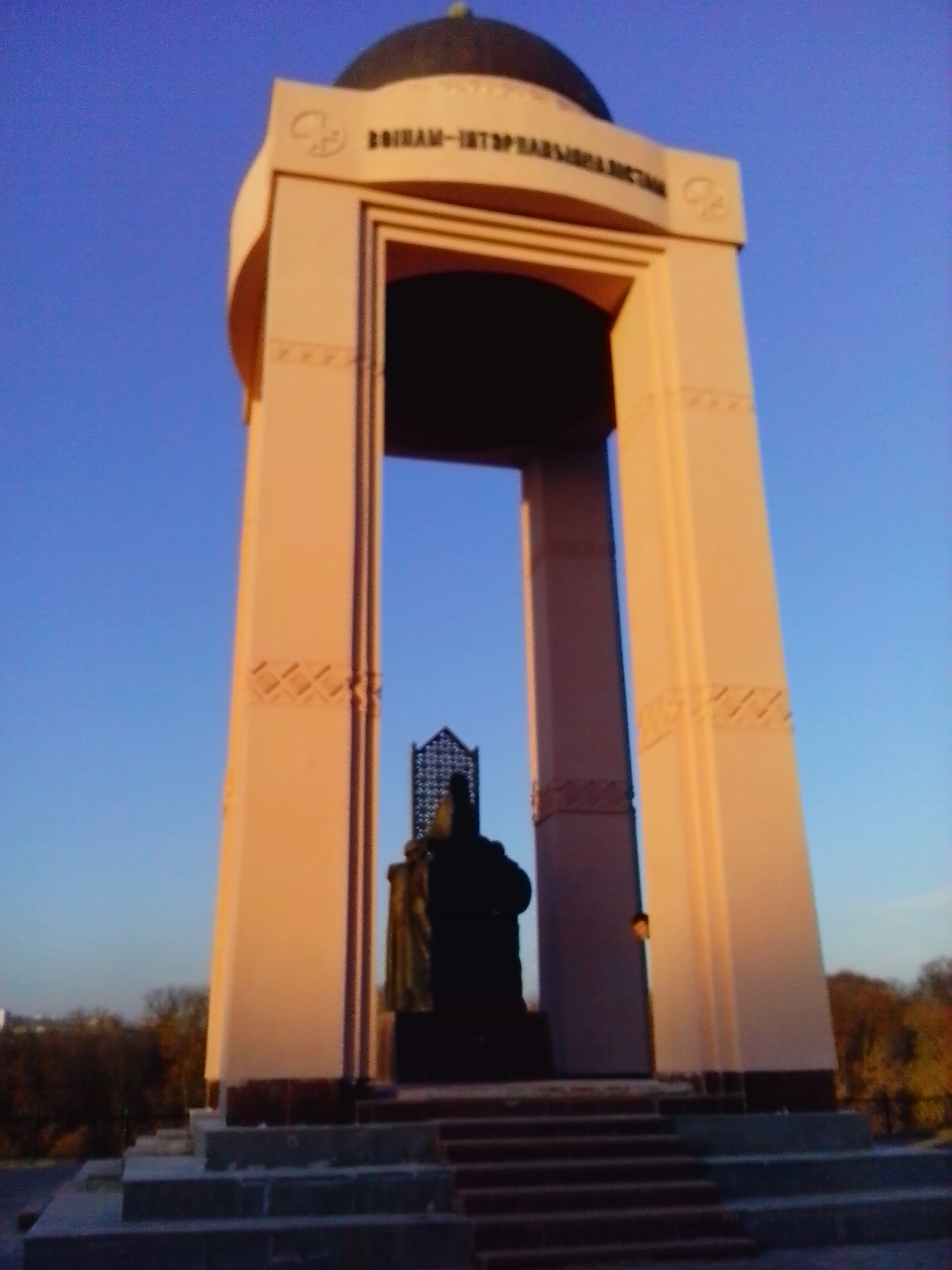 Лупалава, Магілёў, Belarus